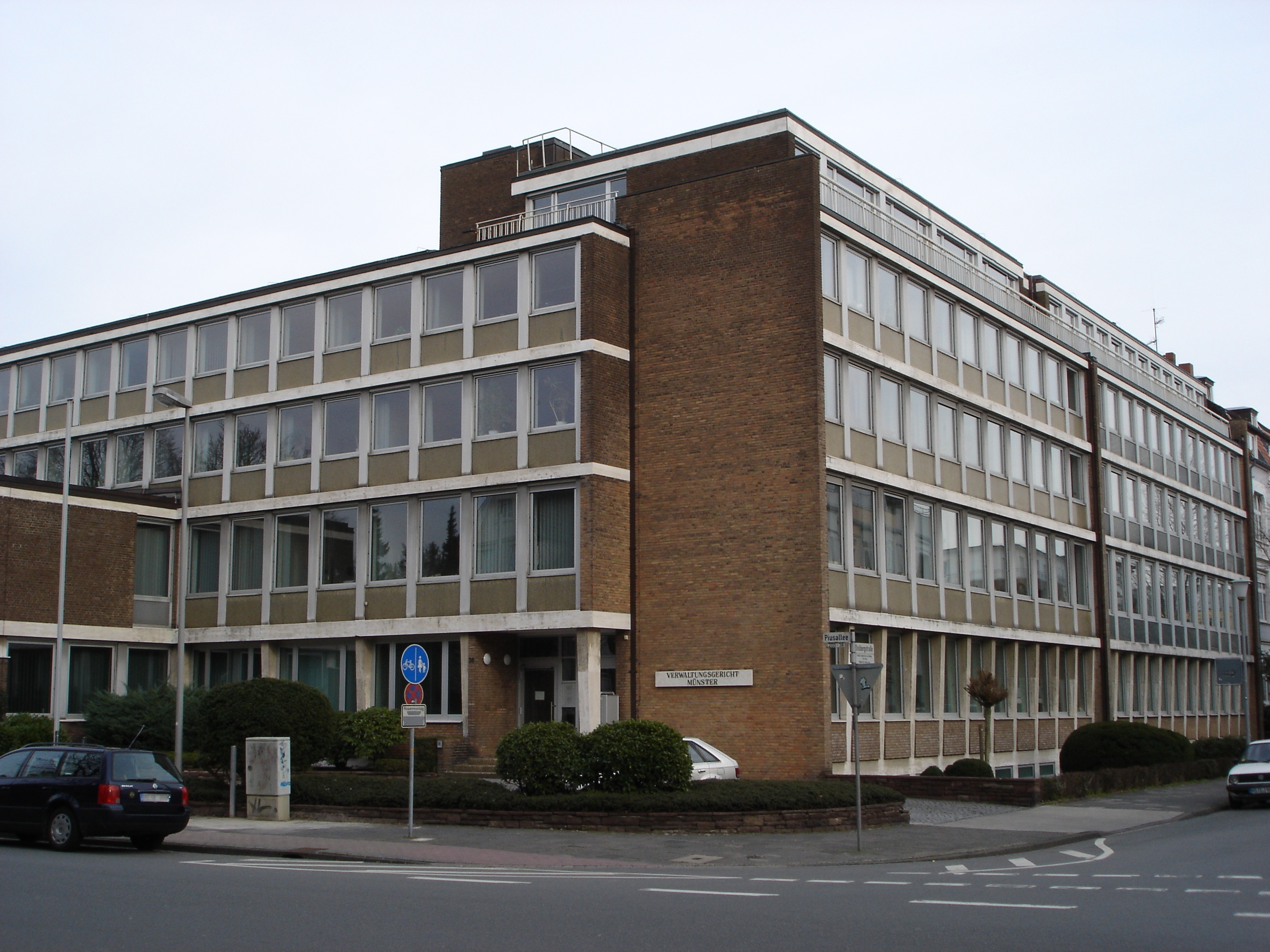 Verwaltungsgericht Münster, Münster, Germany